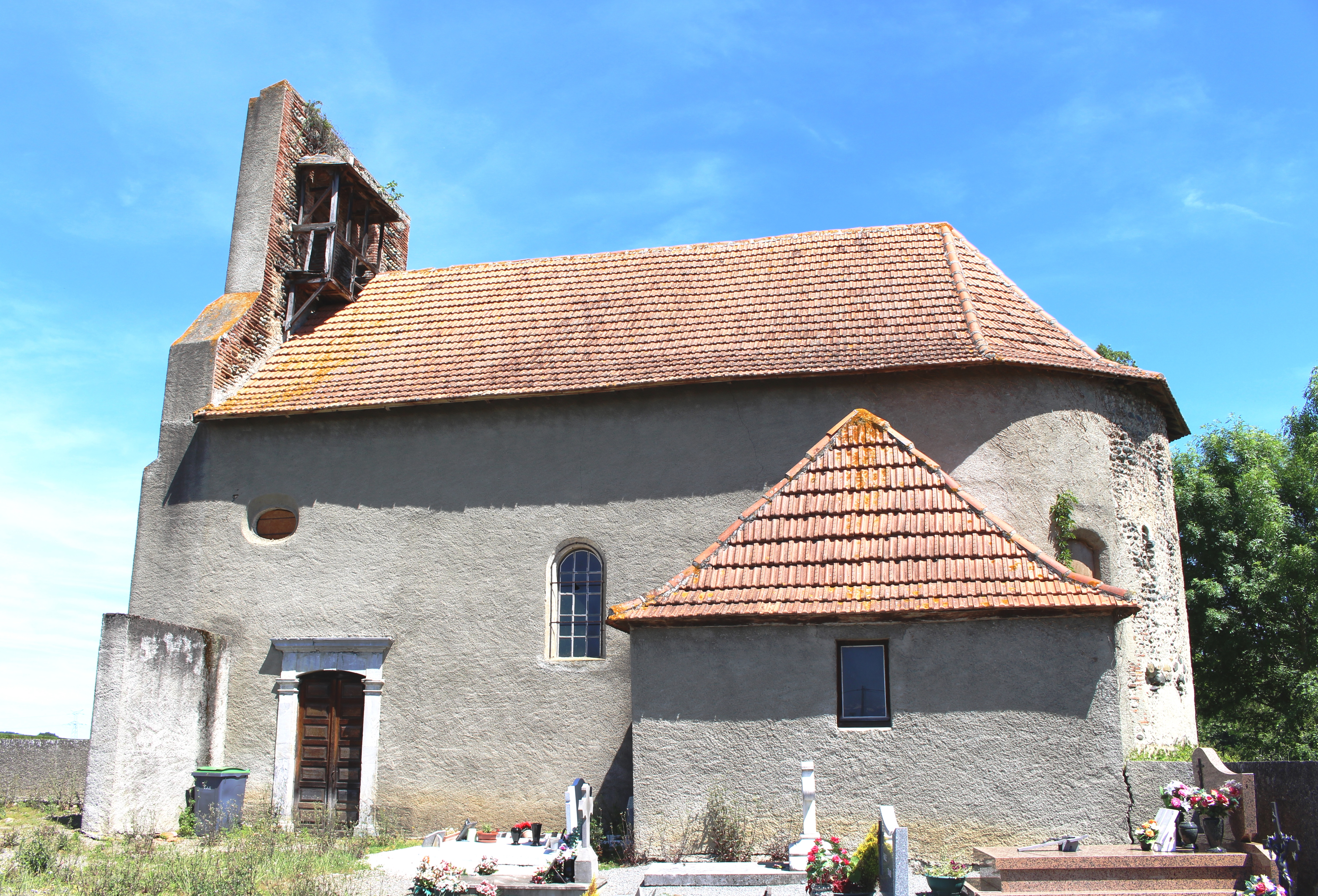 Église de la Nativité-de-la-Sainte-Vierge de Villenave-près-Marsac (Hautes-Pyrénées)